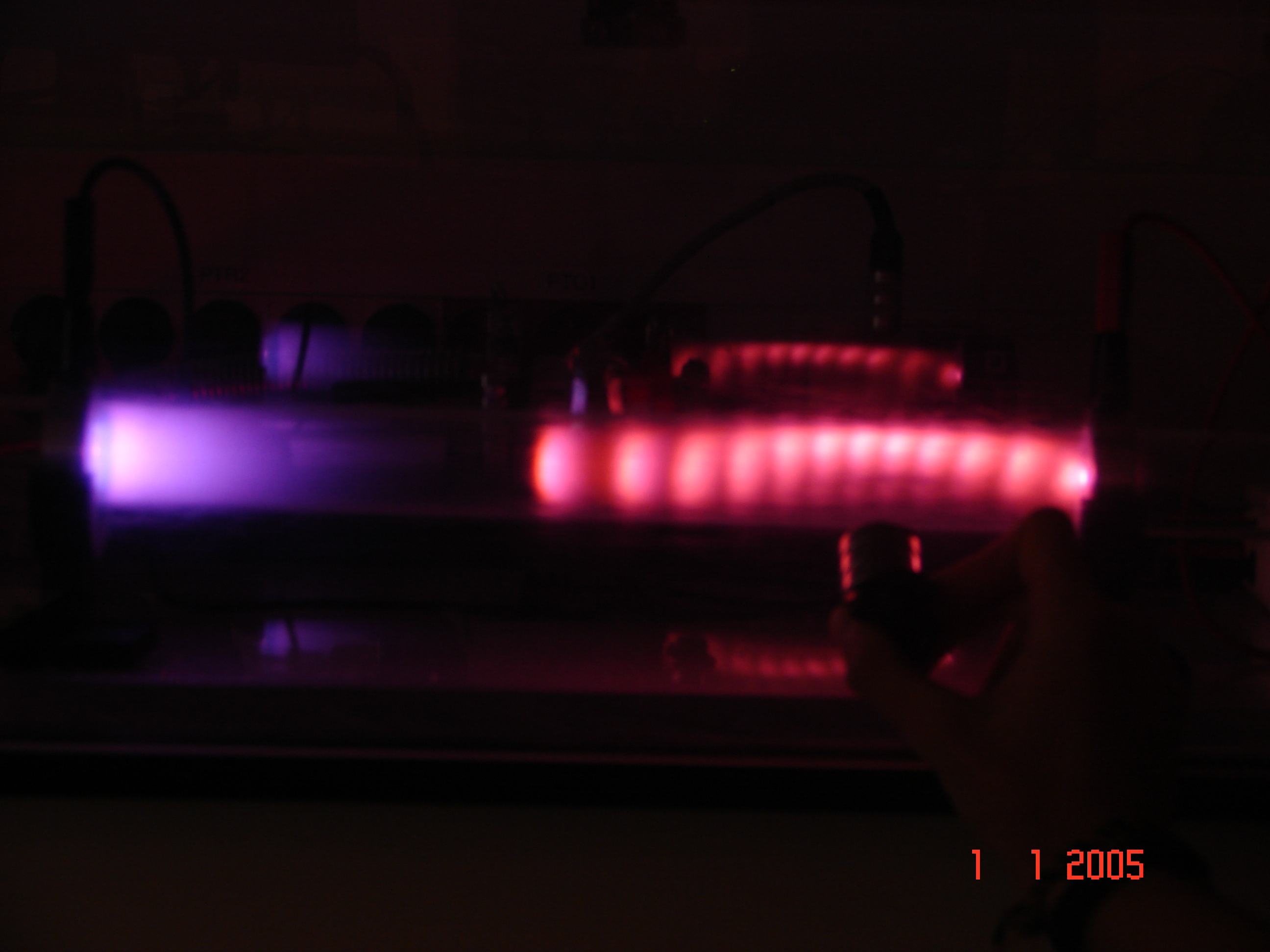 Le plasma est formé dans un tube de verre dans lequel règne une faible pression. Une haute tension électrique (au moins 600V) est imposée entre les deux extrémités du tube. Le Plasma est ici déformé par un aimant simplement posé à coté du tube de verre. Photo prise à l'université Paris 6 Sorbonne-Université.